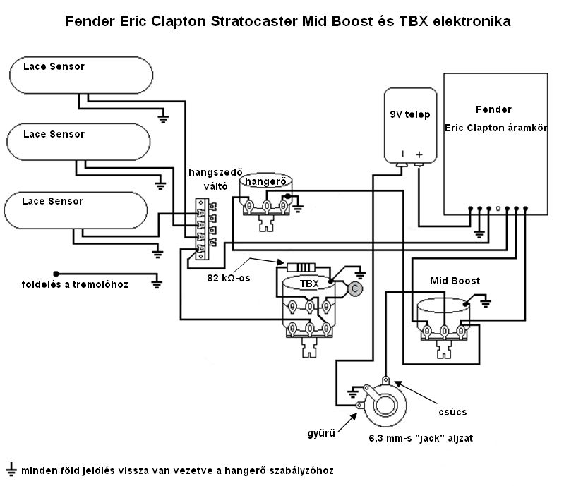 Fender Eric Clapton Stratocaster TBX és Midboost elektronika sematikus rajz